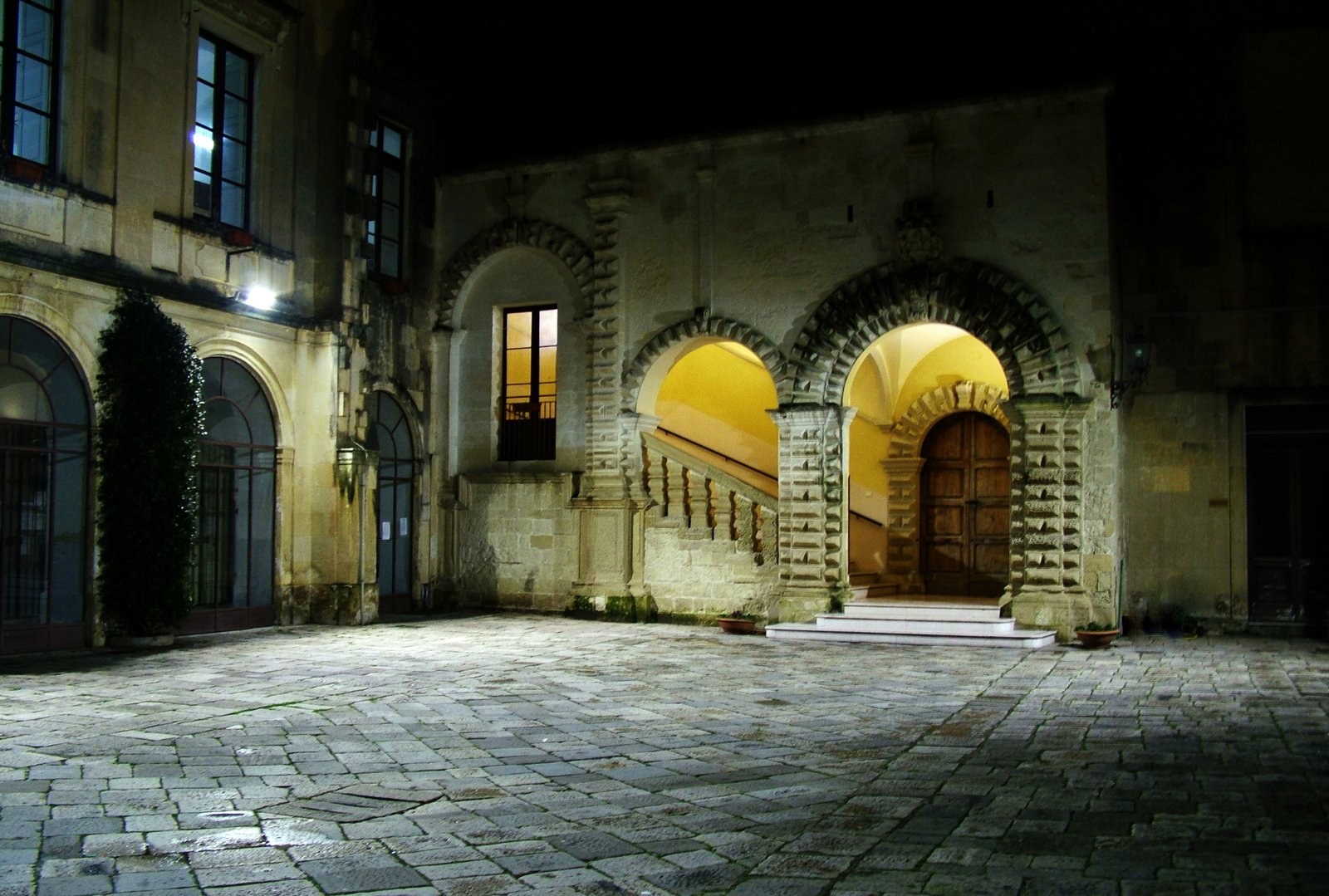 Palazzo baronale "Francesca Capece" This is a photo of a monument which is part of cultural heritage of Italy.